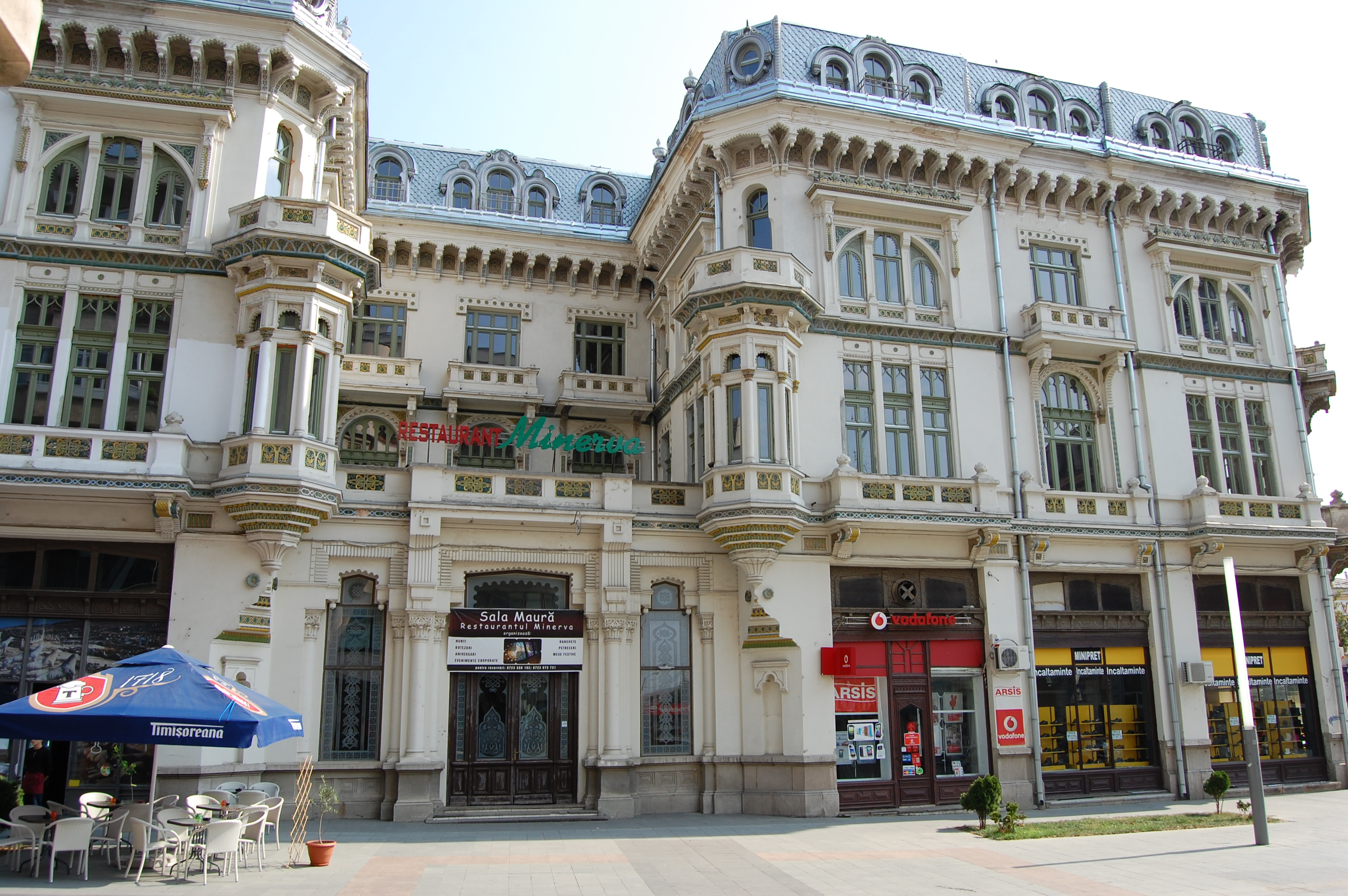 Minerva hotel